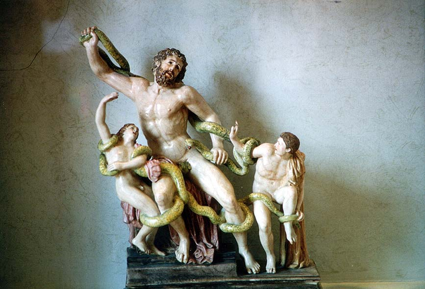 Laocoonte, copia di porcellana nei Musei Capitolini (Roma)